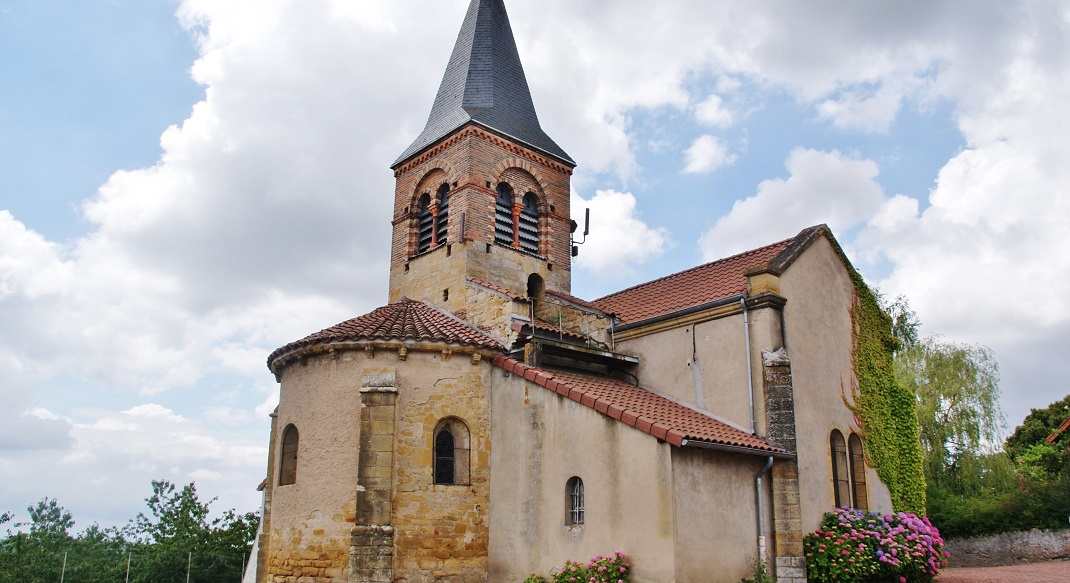 église St Gervais-St Protais